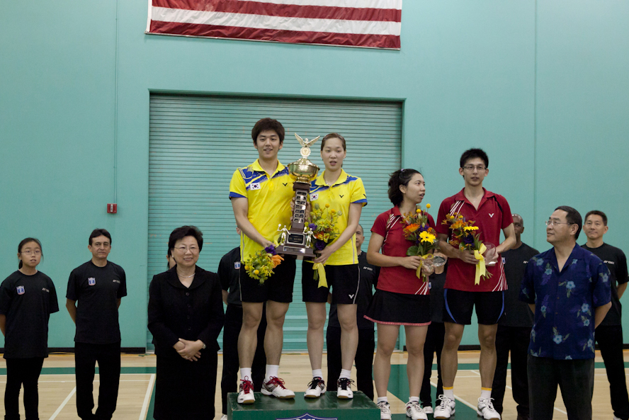 2011 US Open Badminton